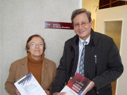 Elpídio Donizetti recebe prêmio na Faculdade de Lisboa